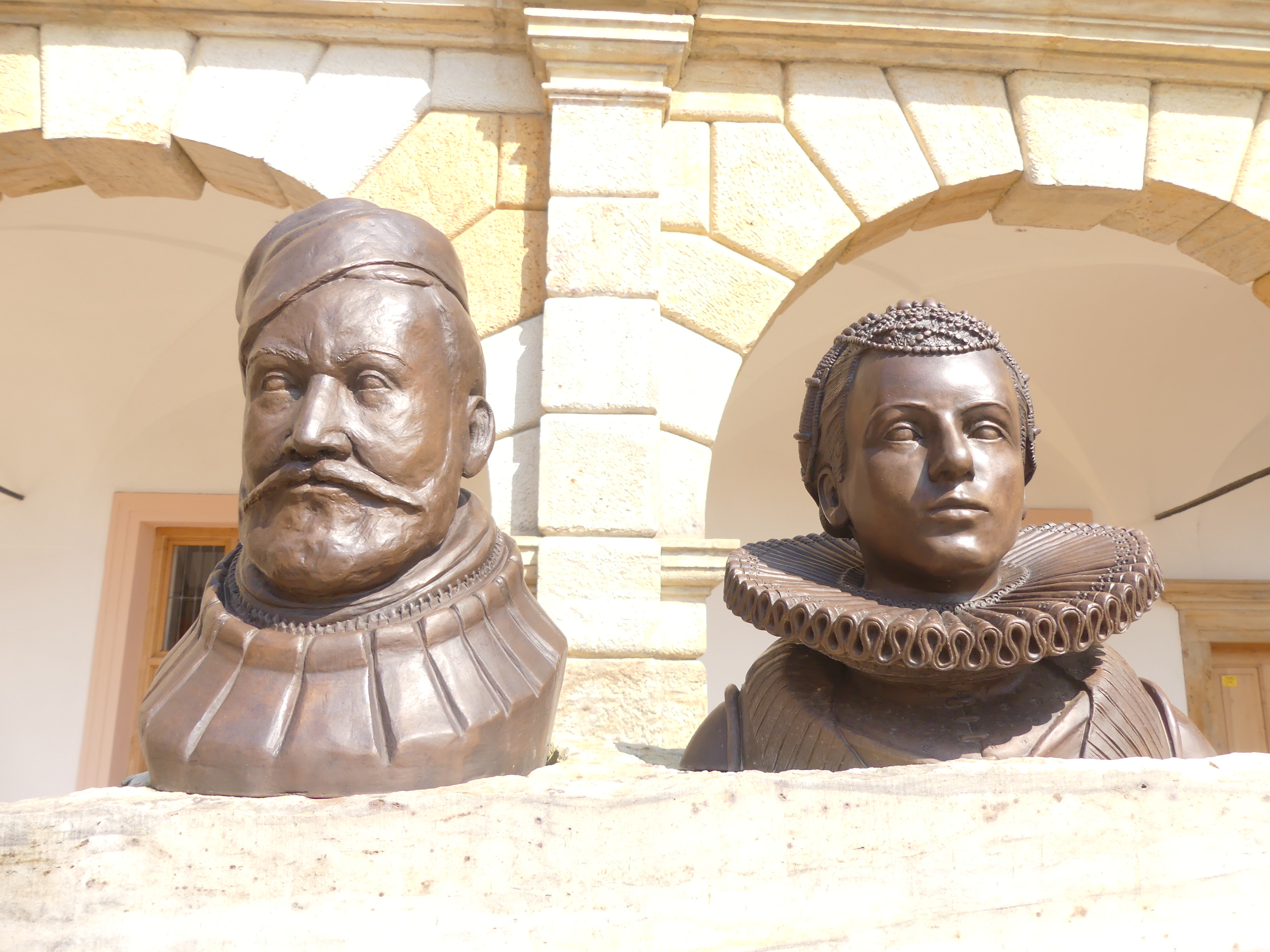 Ladislav Velen ze Žerotína (1579 - 1638) s manželkou Bohunkou rozenou z Kunovic (1582–1614), nádvoří zámku v Moravské Třebové, detail